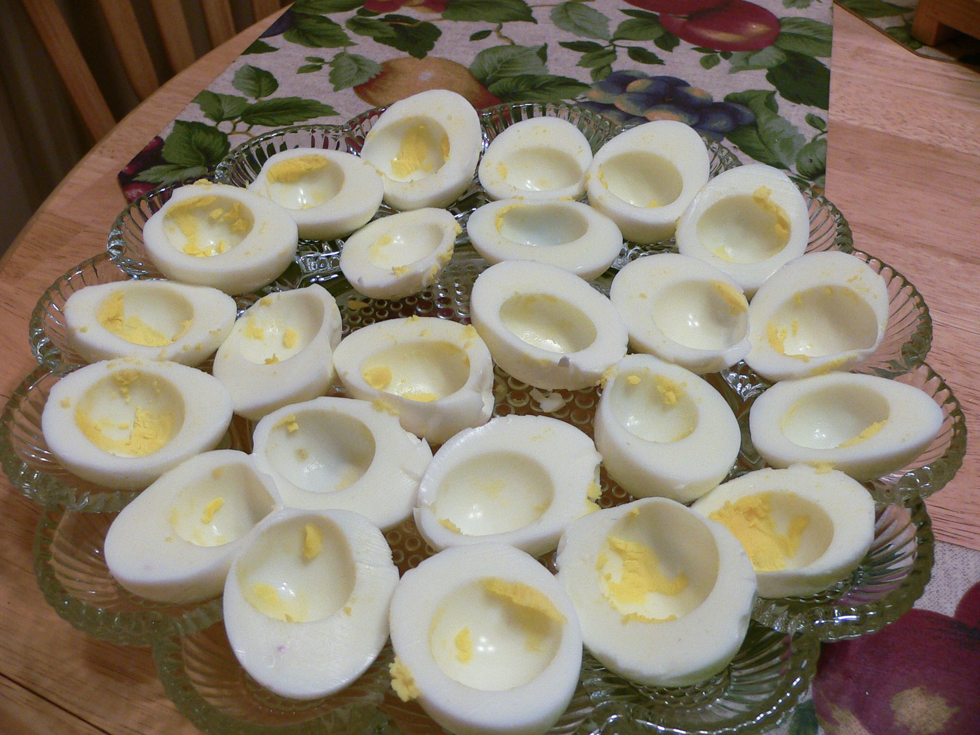 Nachystané bílky bez žloutků vajíček uvařených na tvrdo